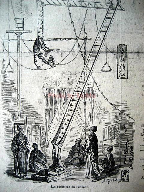 はしご芸を練習する日本の軽業師。隅田川浪五郎率いる日本帝国一座。パリ万国博覧会 (1867年)